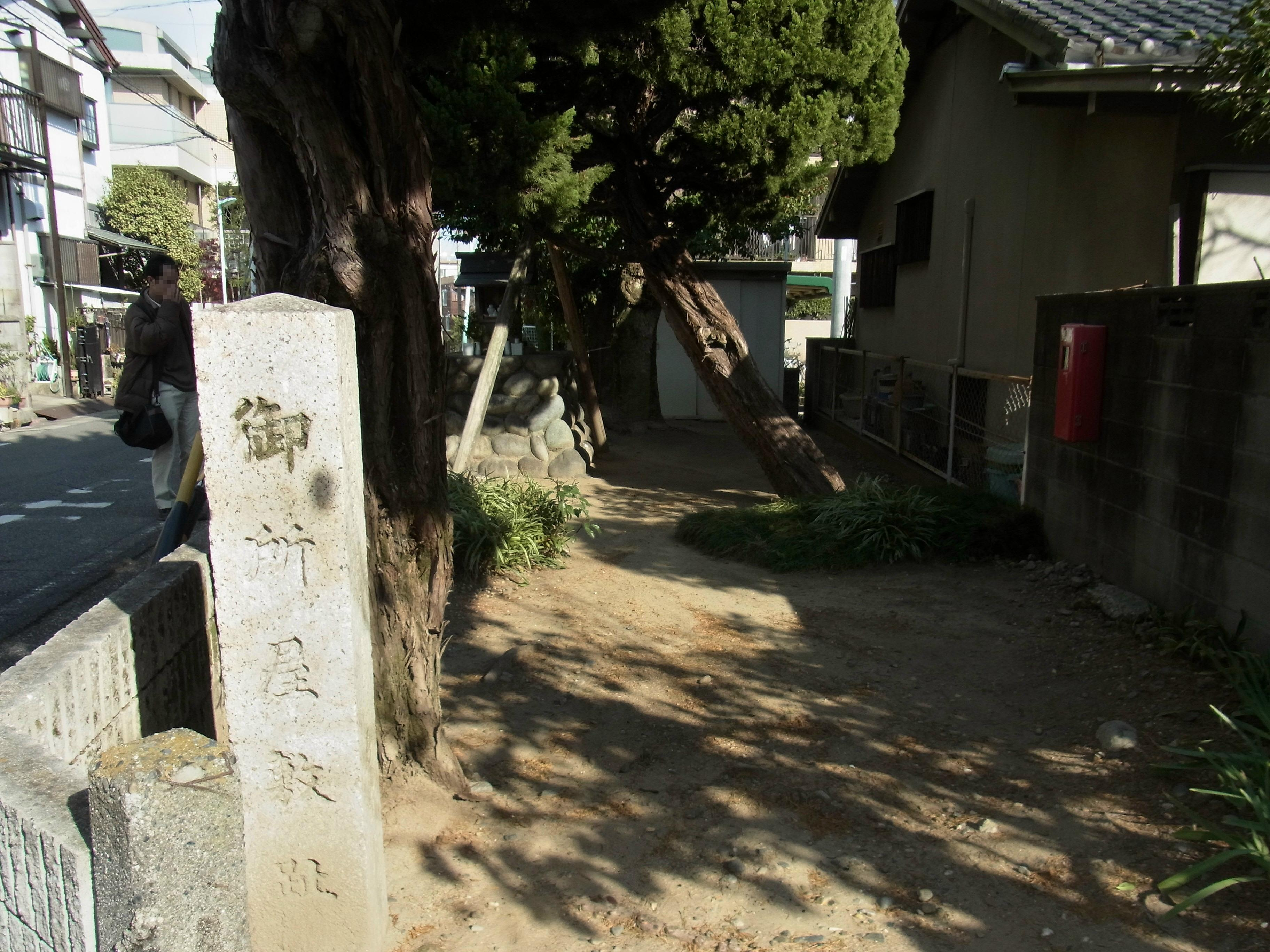 御所屋敷跡（伝大政所屋敷跡）